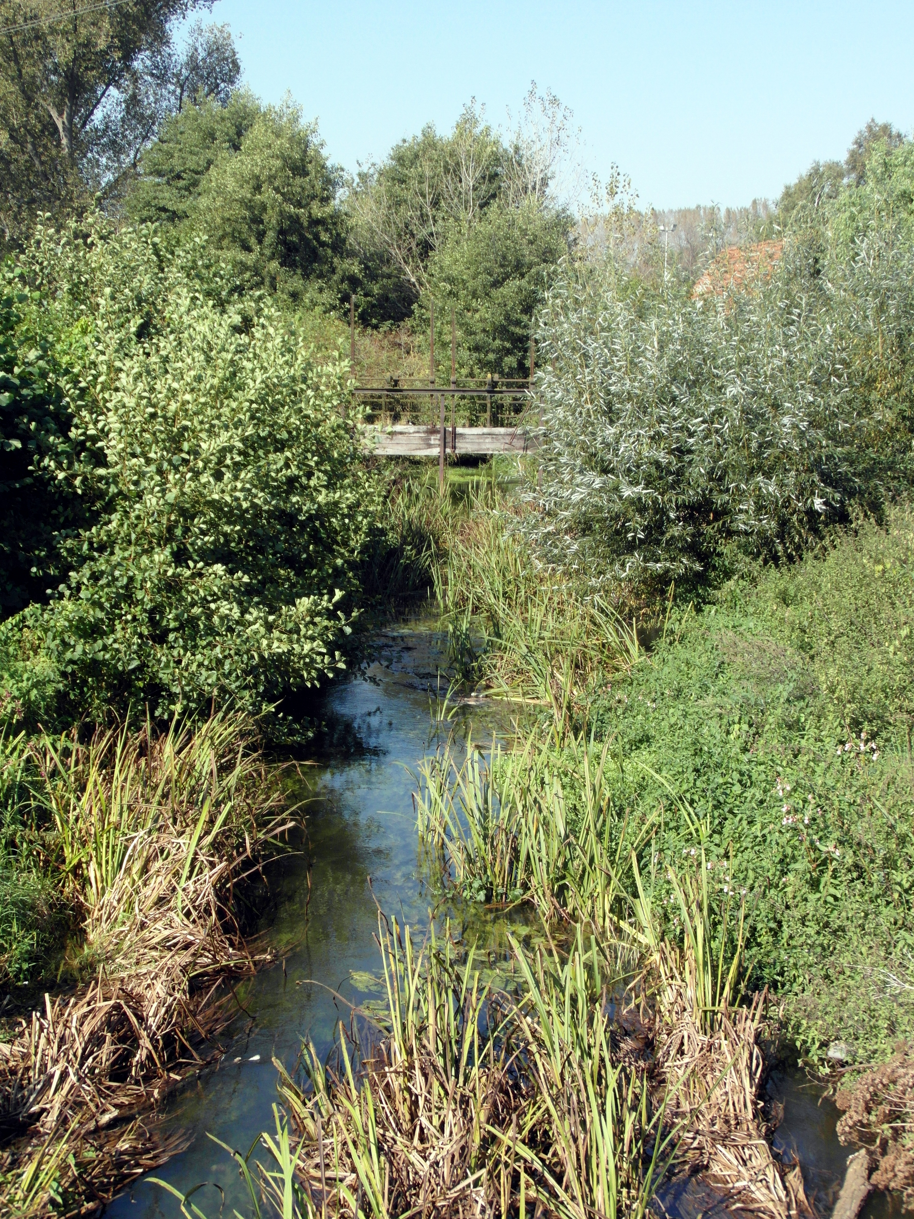 Die Südaue hat südlich von Groß Munzel die L392 unterquert und fließt nach Nordwest